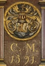 Markdanners våbenskjold og initialer, malet på prædikestolen i Sankt Nicolai Kirke, Kolding.